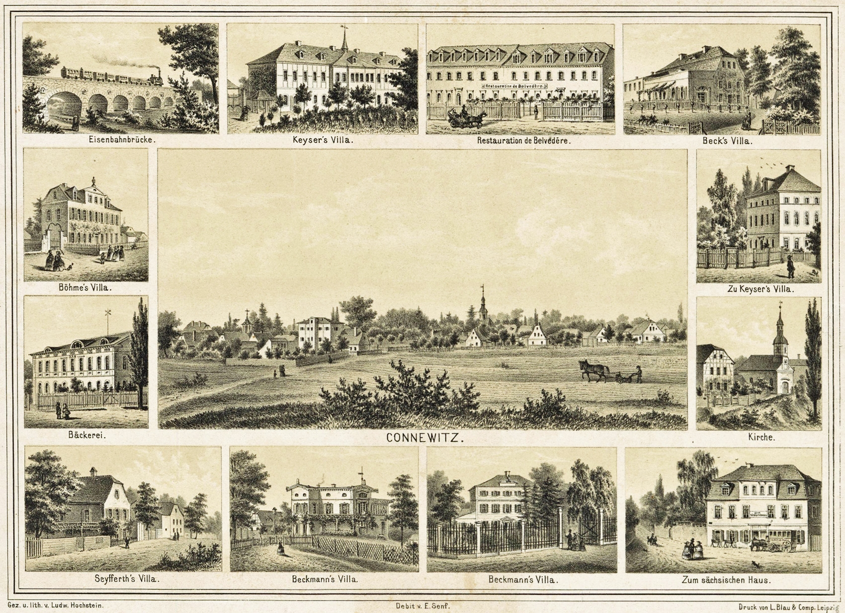 Ansichten von Connewitz um 1850